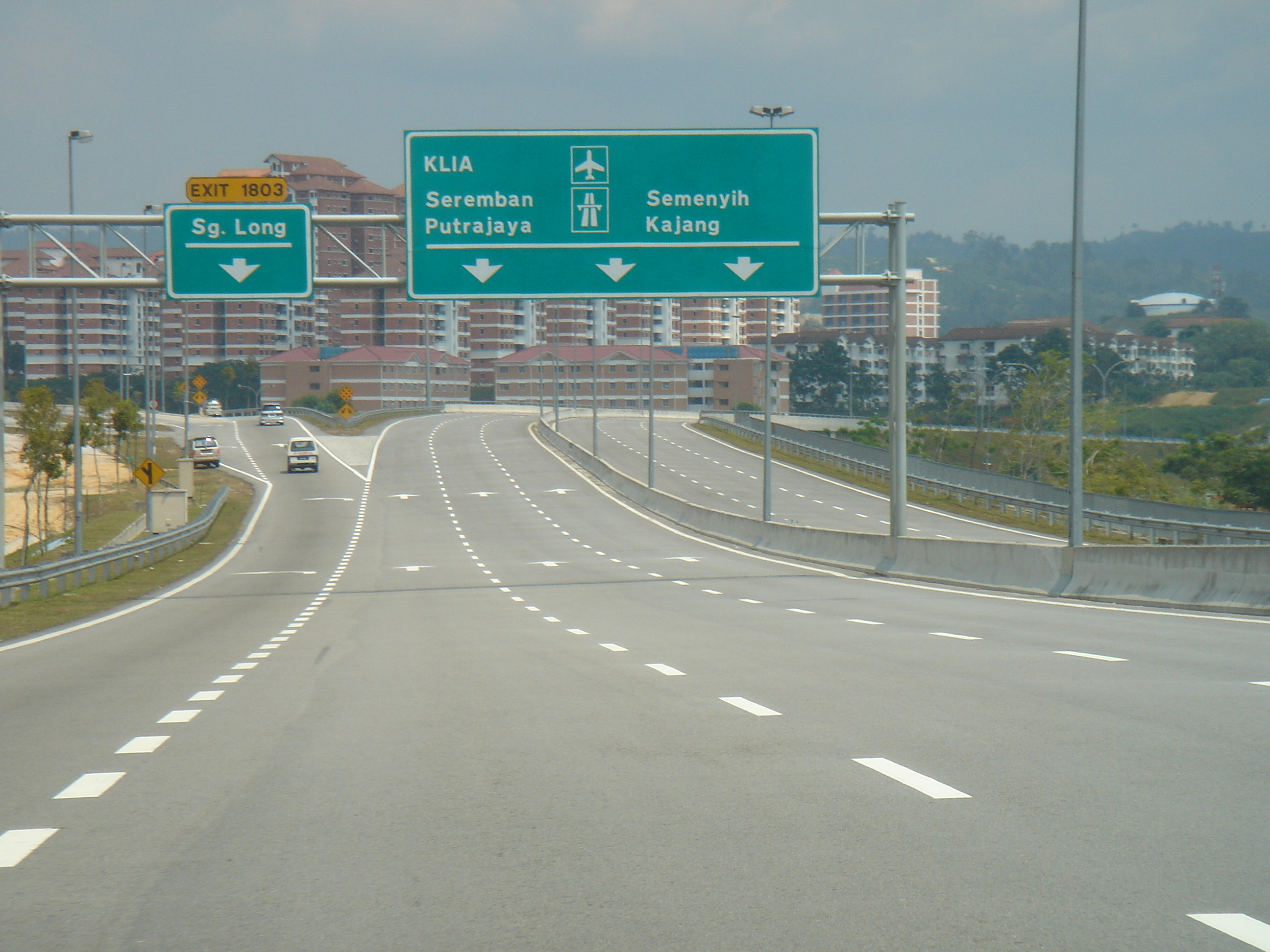 Sungai Long exit, Kajang Dispersial Link Expressway, Malaysia.